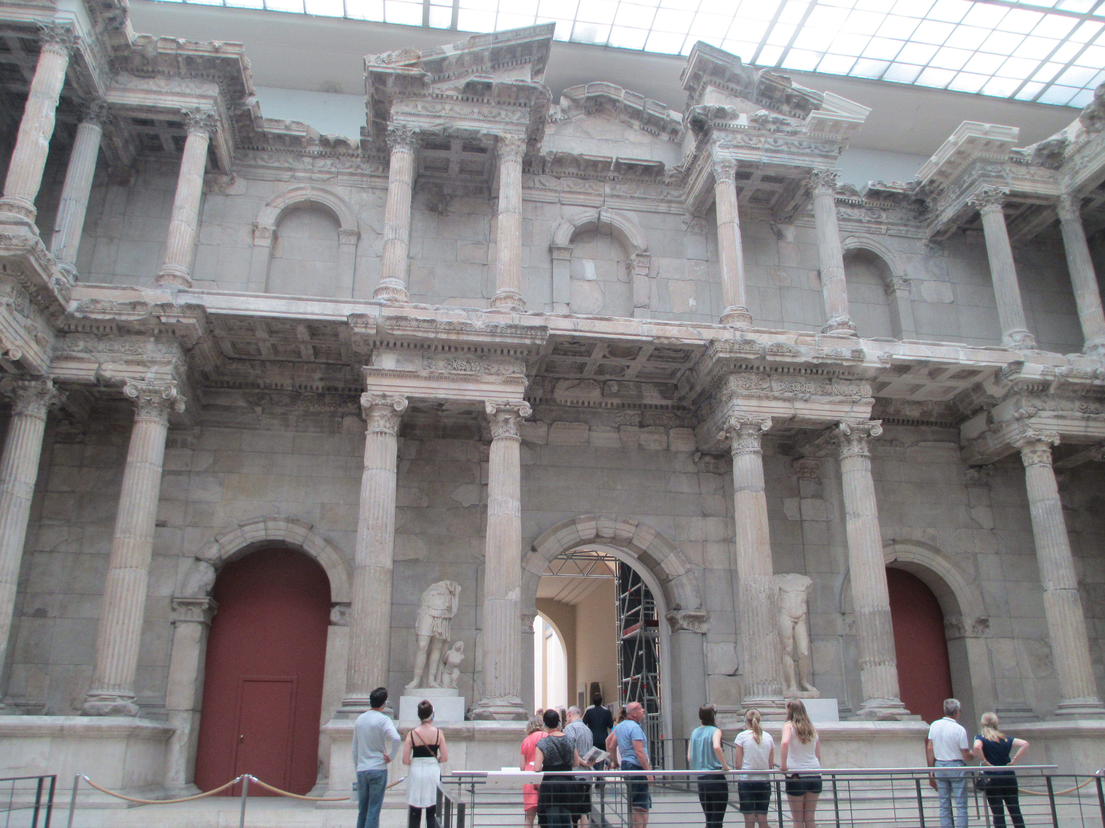 שער השוק של מילטוס במוזיאון פרגמון